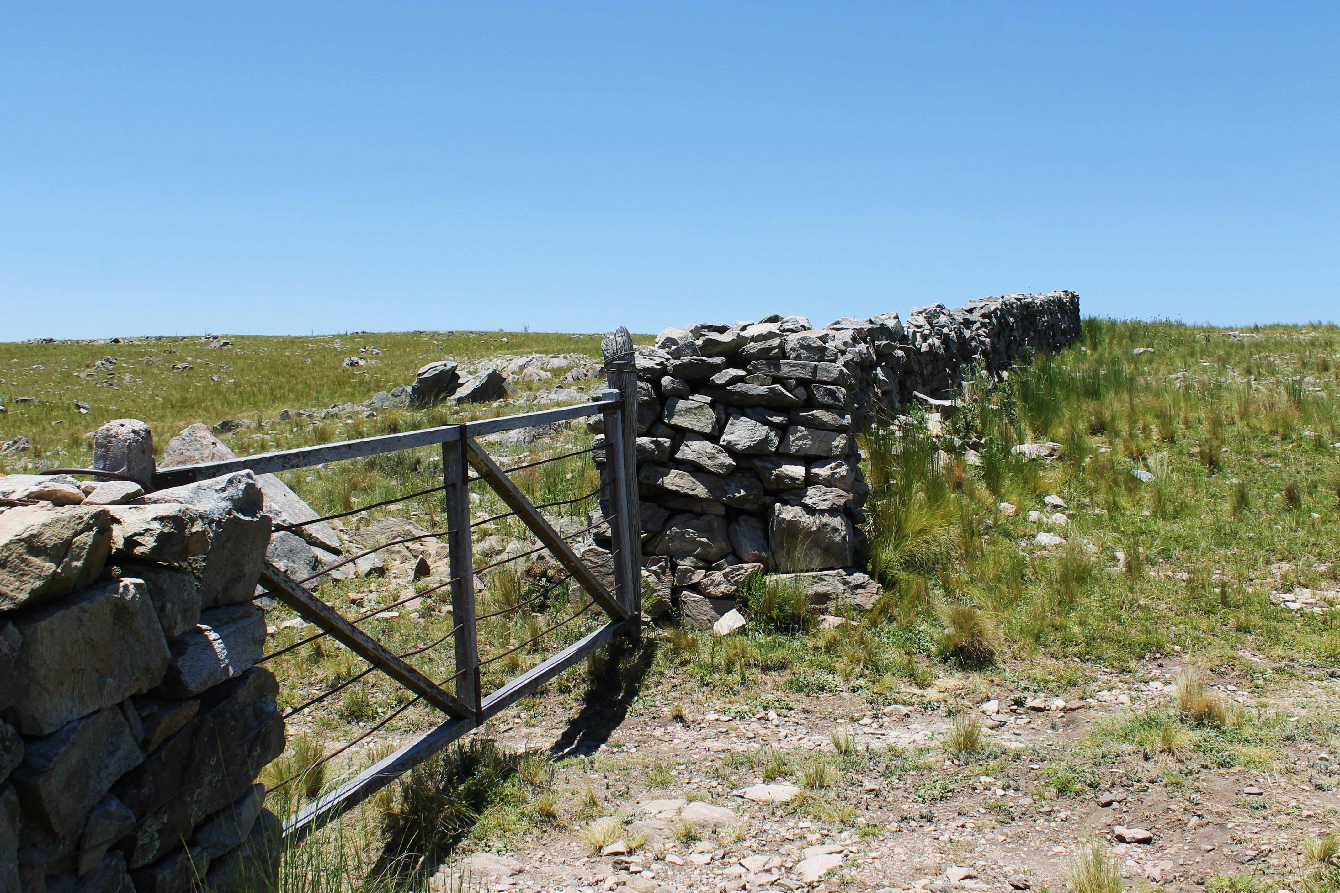 Pirca muy antigua en las Sierras de San Luis